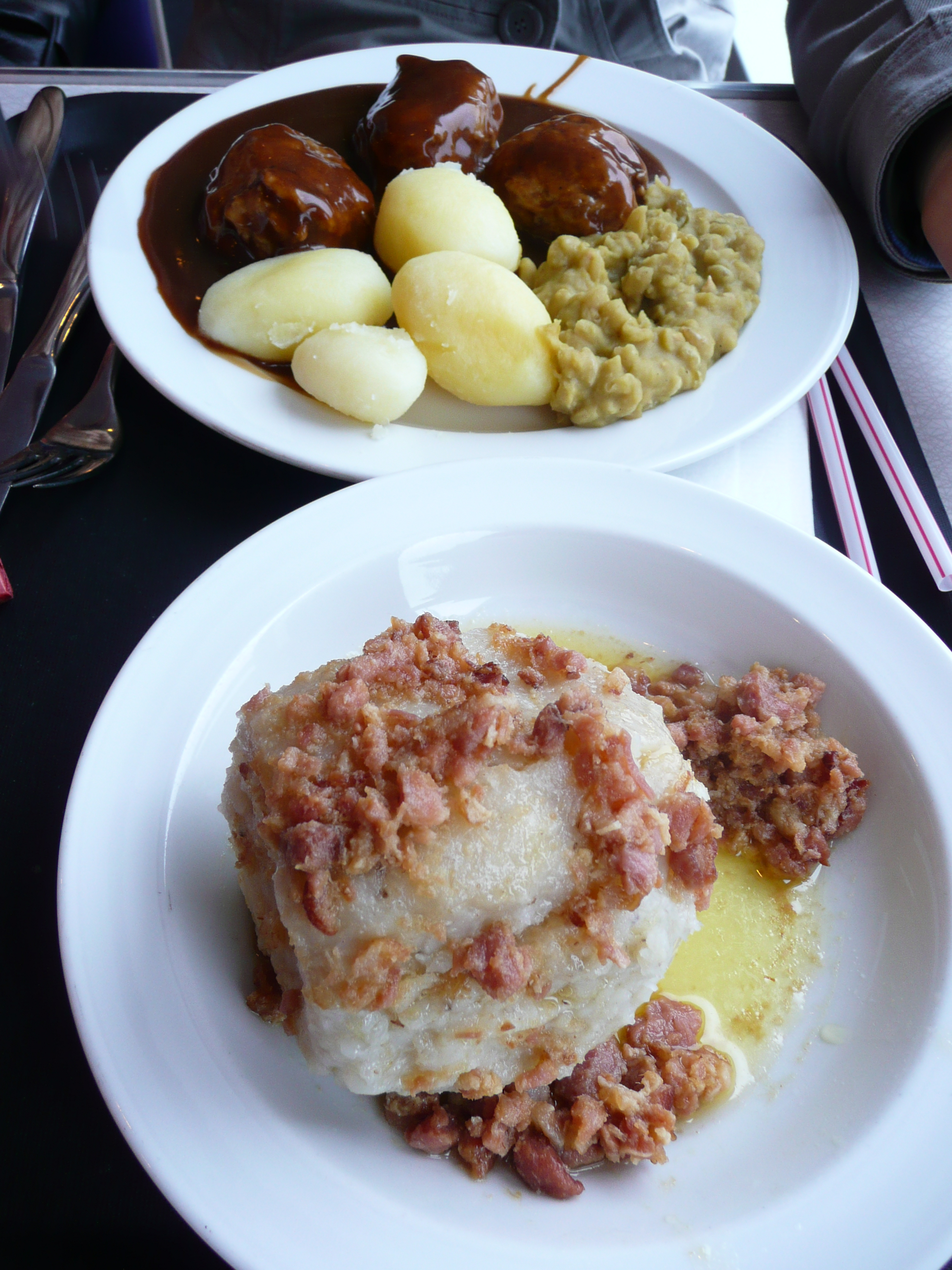 norwegian meal